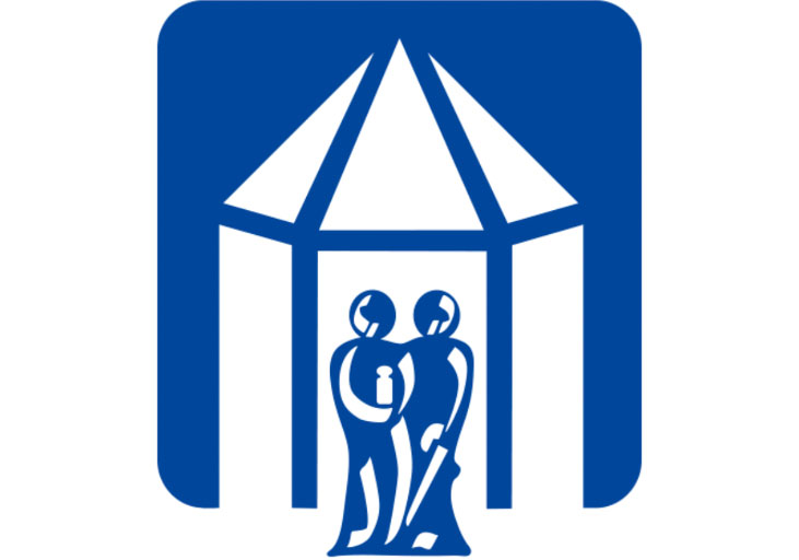 Firmen Logo